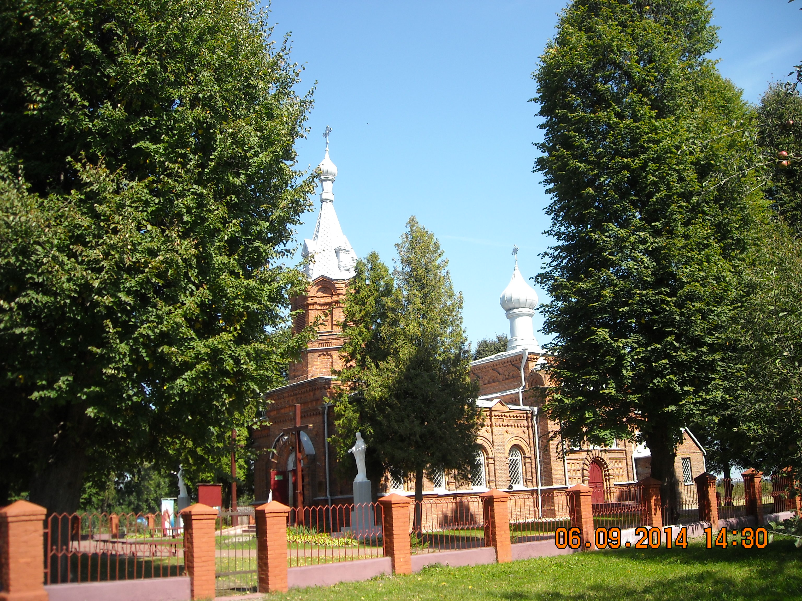 Czułczyce - dawna cerkiew prawosławna p.w. św. Aleksego, ob. rzymskokatolicki kościół parafialny pw. św. Rocha, 1905 r.